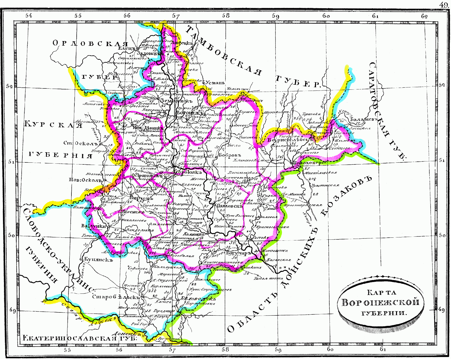 Карта Воронежской губернии, 1835